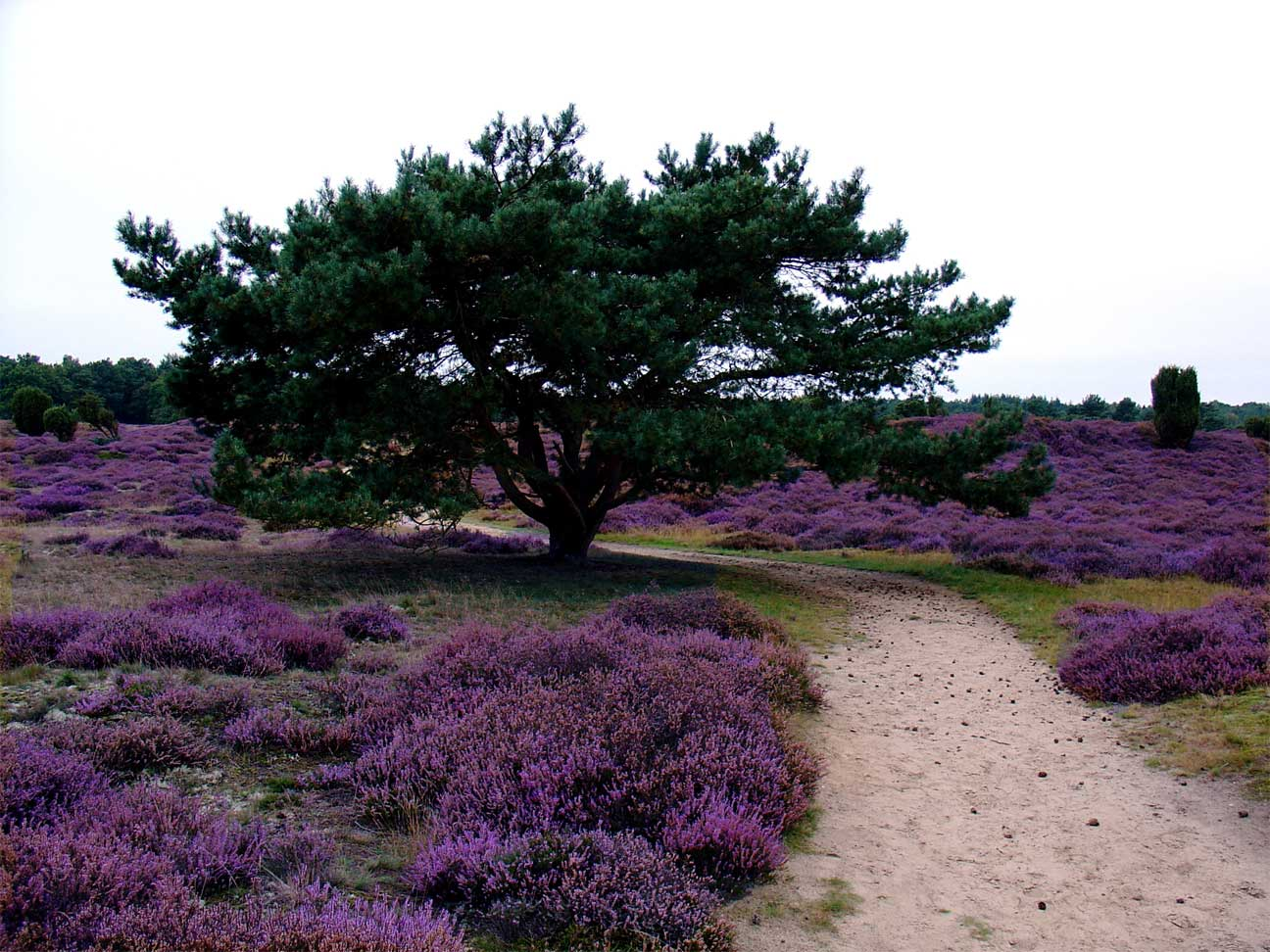 Het Natuurgebied "Het Drouwnerzand